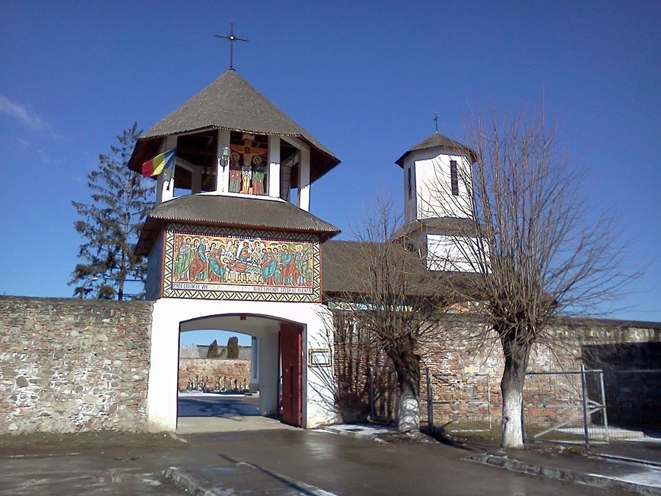 Turn clopotniță 03